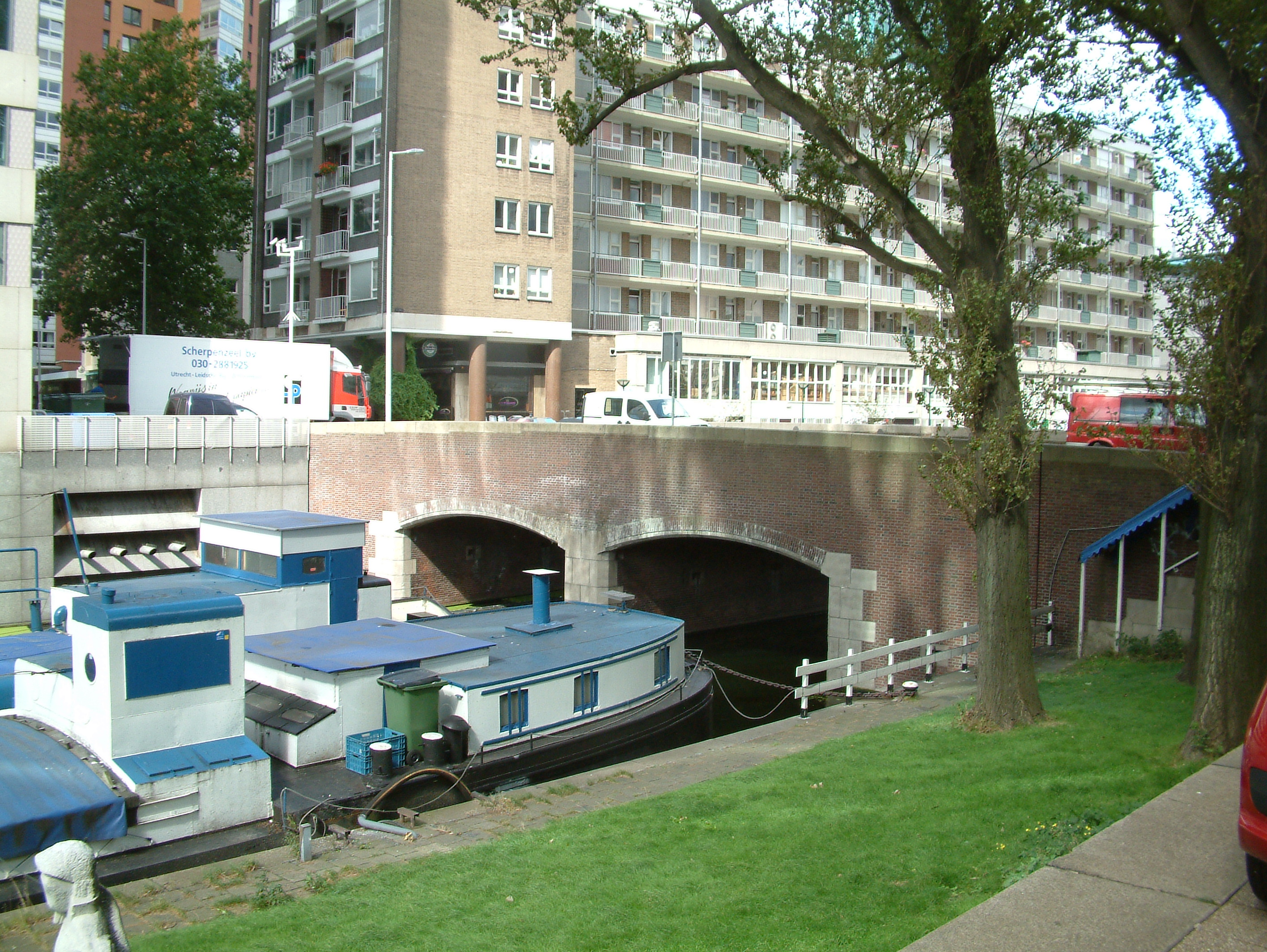 Bruggen over de Rotte, De Soetenbrug, zuidlkant